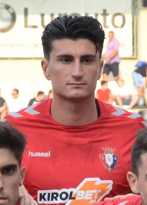 CSC_0149